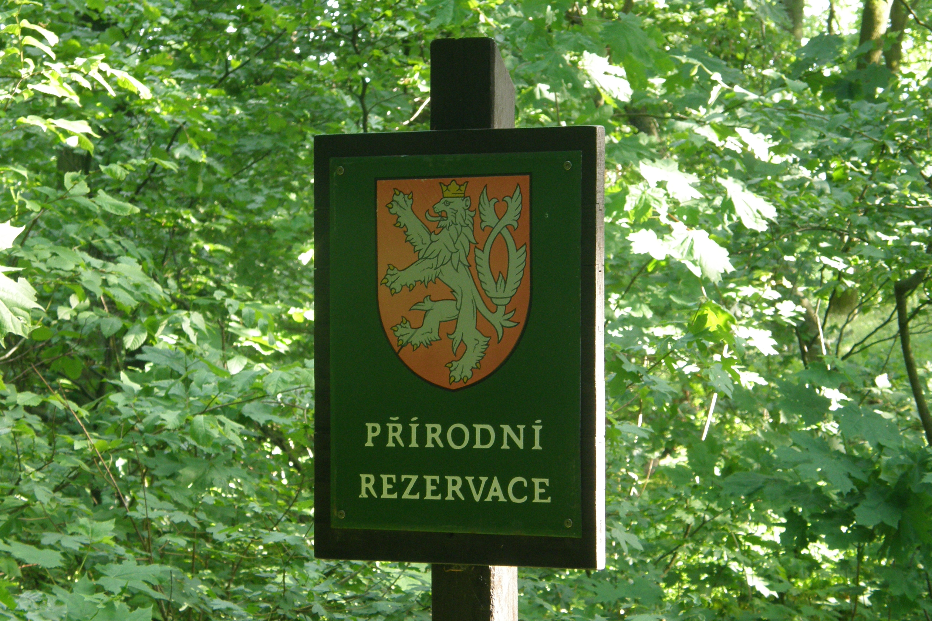 Značka v severozápadní části přírodní rezervace Dřínová